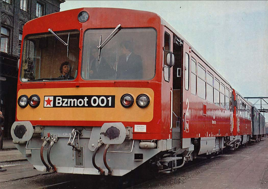 Bzmot 001-es motorvonat eredeti (gyári) Állapotban